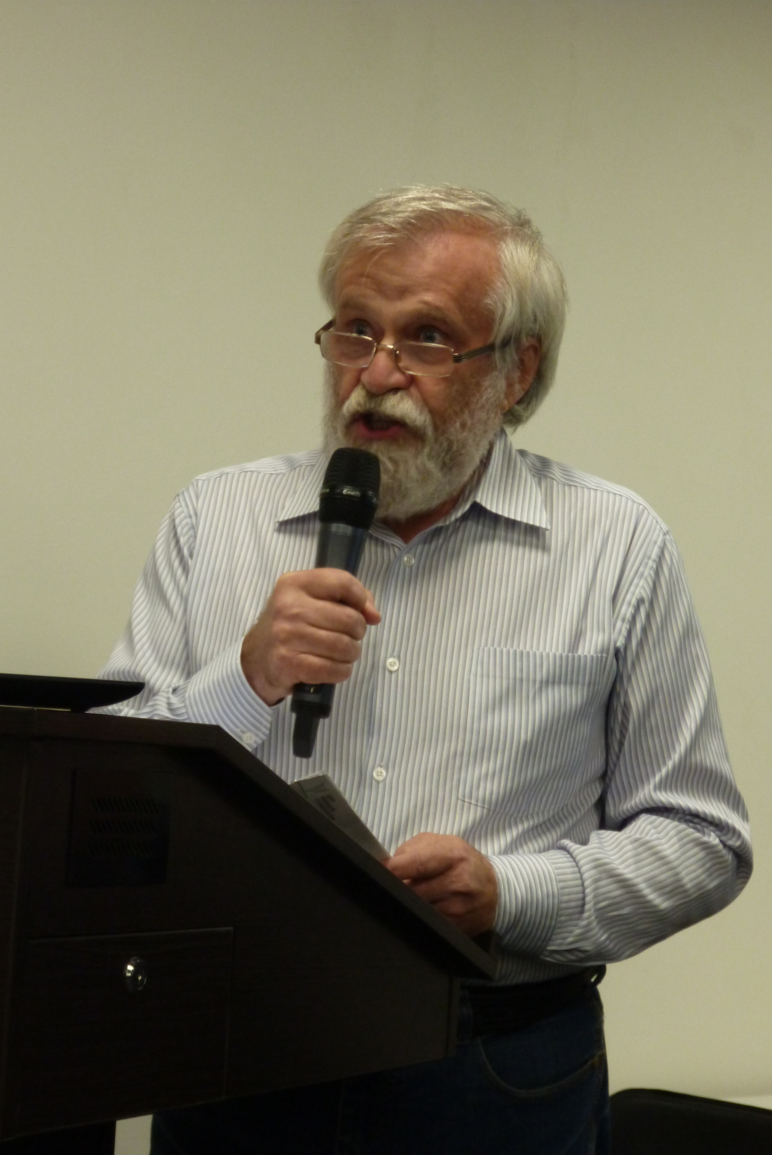 Мосин Алексей Геннадьевич ведет круглый стол по Чехословацкому корпусу в Ельцин-центре. 23 октября 2018 года.